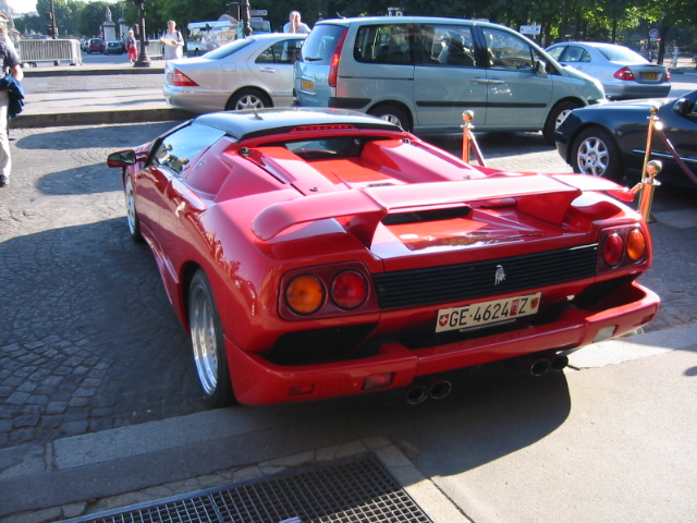 Lamborghini Diablo - Hotel Crillon à Paris Plaques d'immatriculation temporaires « Z » du canton de Genève, Suisse.